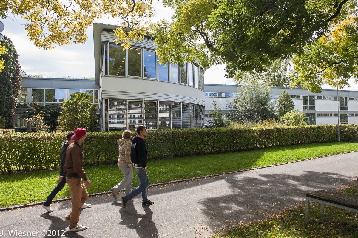 Der Bibliothekstrakt der HAK Bregenz. Unten befindet sich die Kantine mit Blick auf das Schulbiotop.